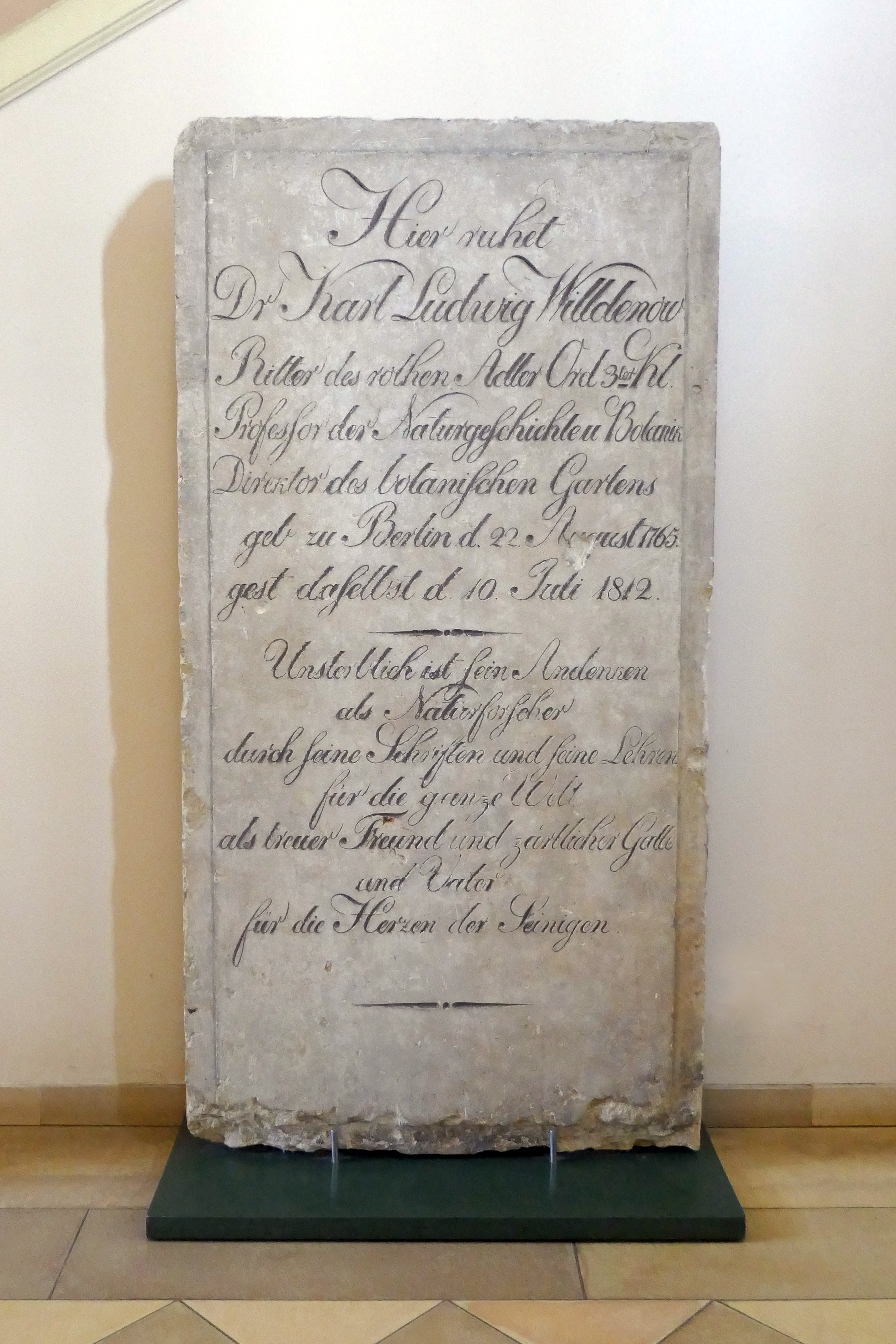 Stéle funéraire de Karl Ludwig Willdenow. Musée botanique de Berlin.